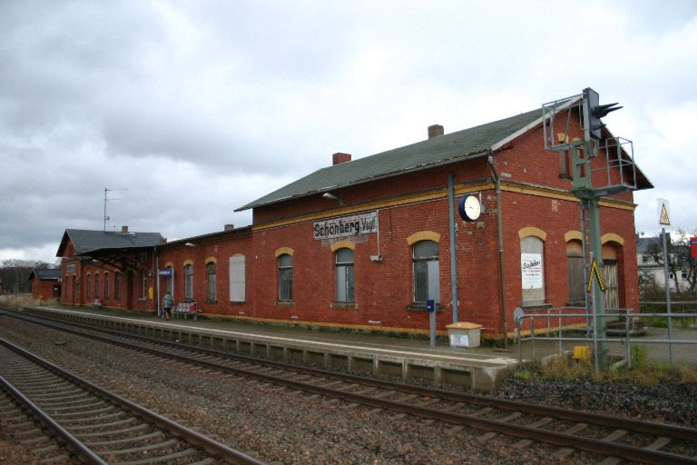 Bahnhof Schönberg (Vogtland), Mehltheuer